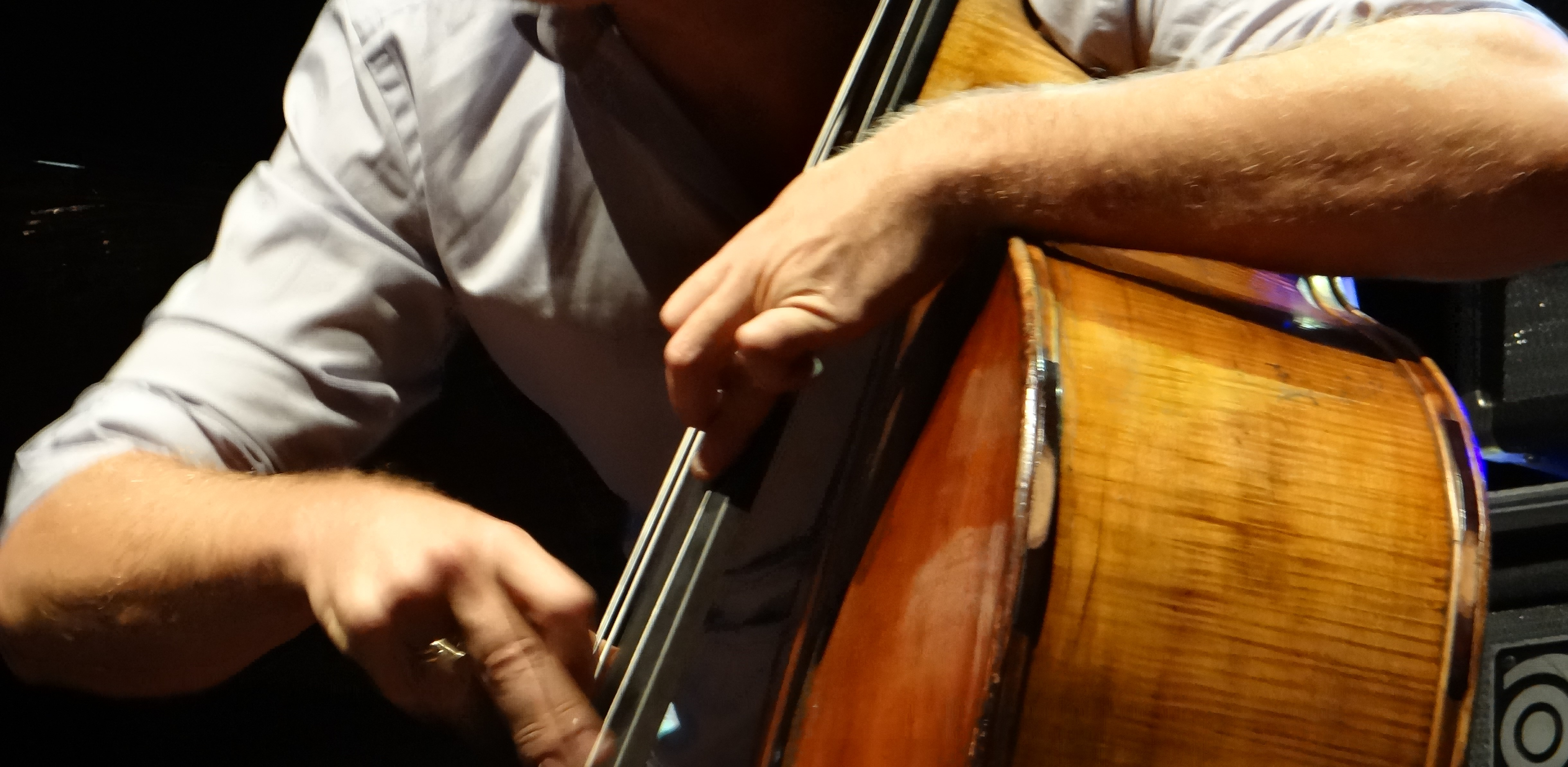 Concierto de Avishai Cohen en el Festival de Jazz de Cartagena 2016